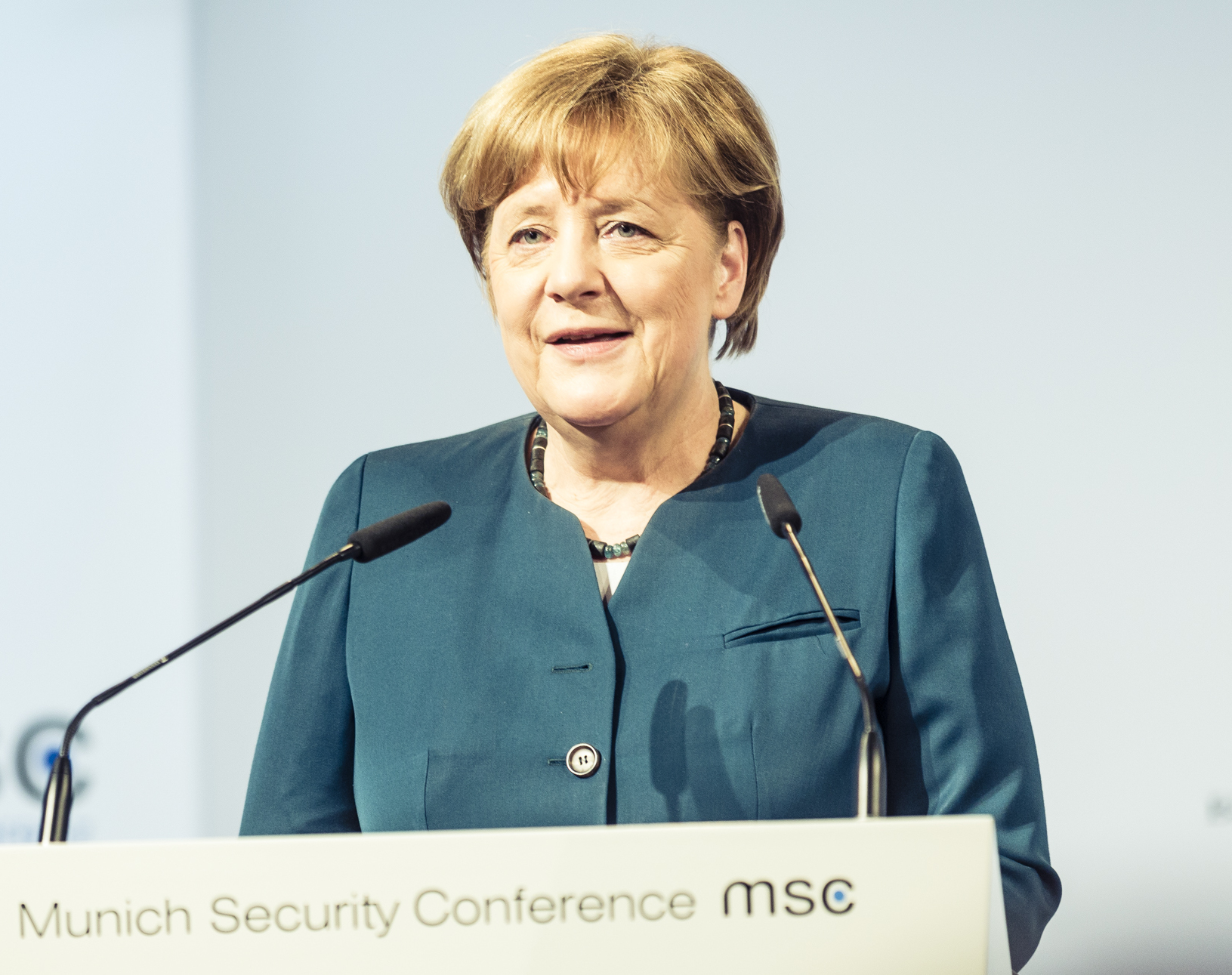 Angela Merkel während der Münchner Sicherheitskonferenz 2017